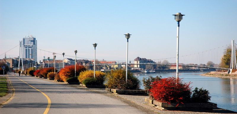 Promenade in Osijek